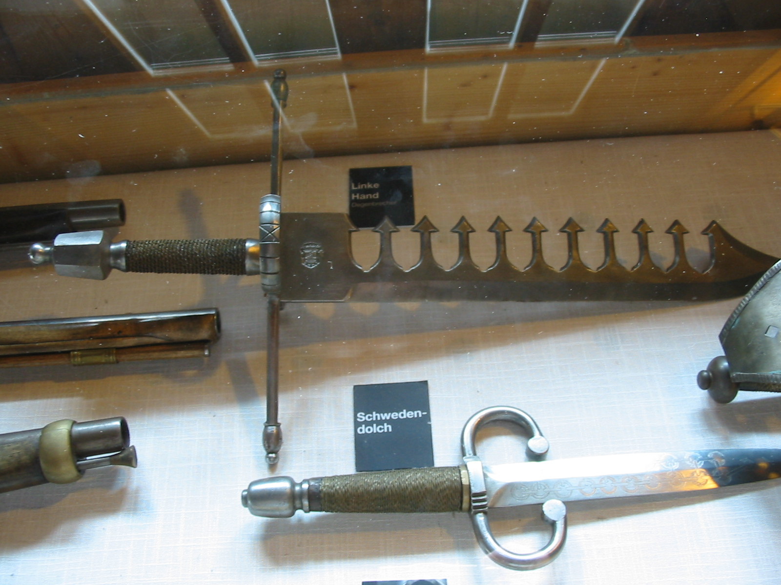 Historische Waffensammlung von Ernst Urschitz (* 12. Jänner 1925 - † 07. Jänner 2003) im Turm von Schloss Ulmerfeld